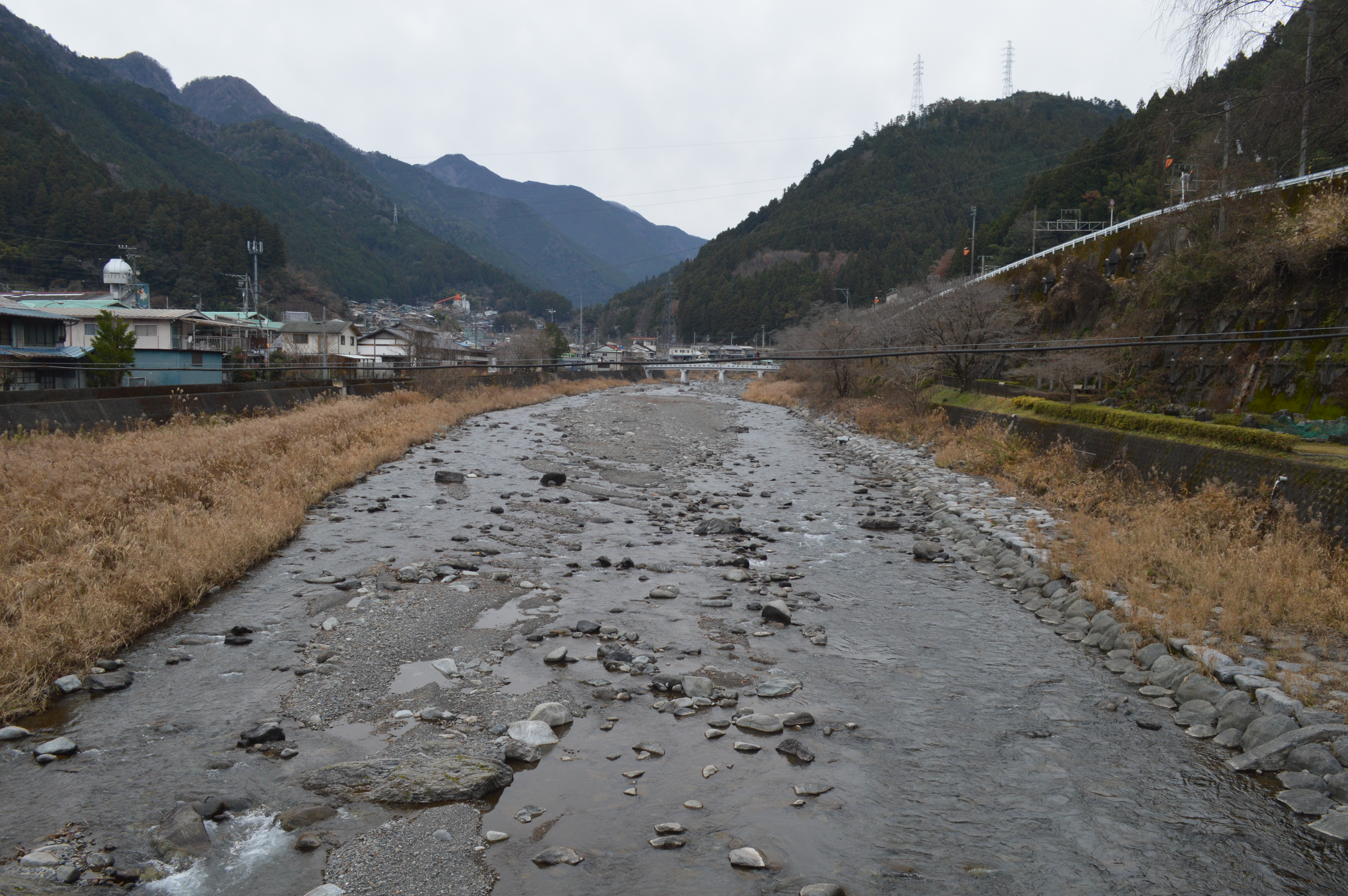 天竜川支流の水窪川。静岡県浜松市天竜区水窪町。